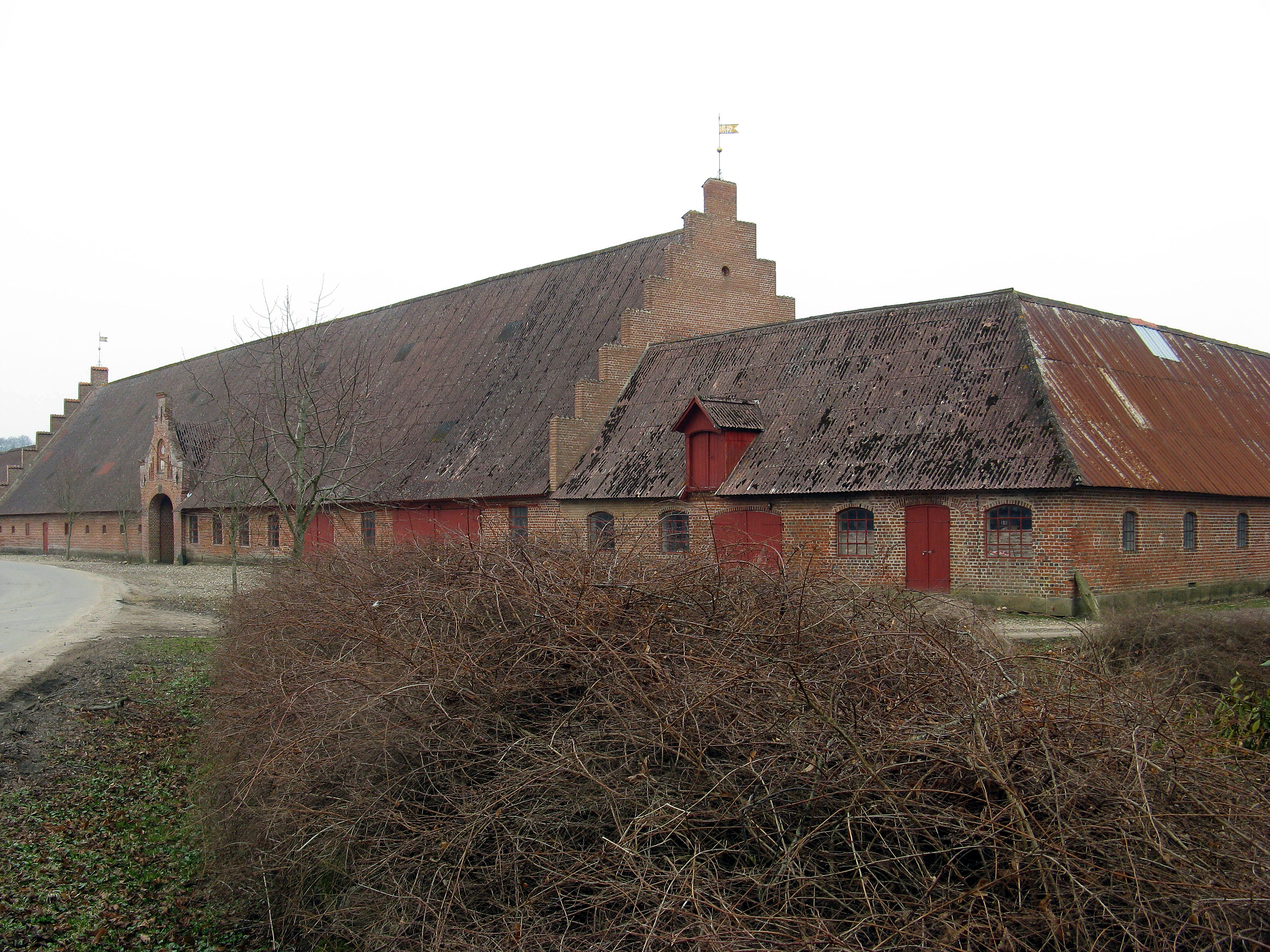 Bidstrup avlsbygninger